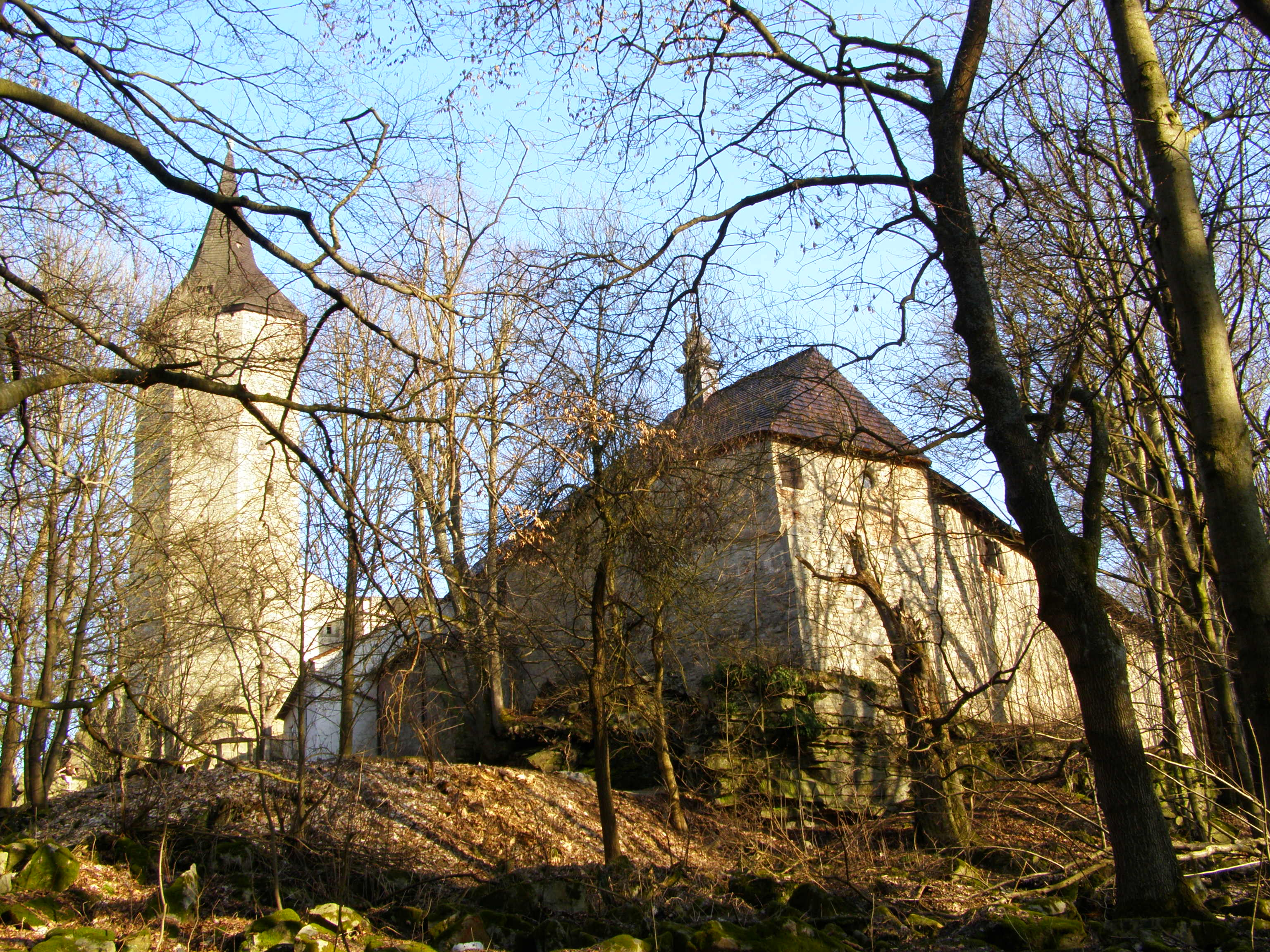 Roštejn